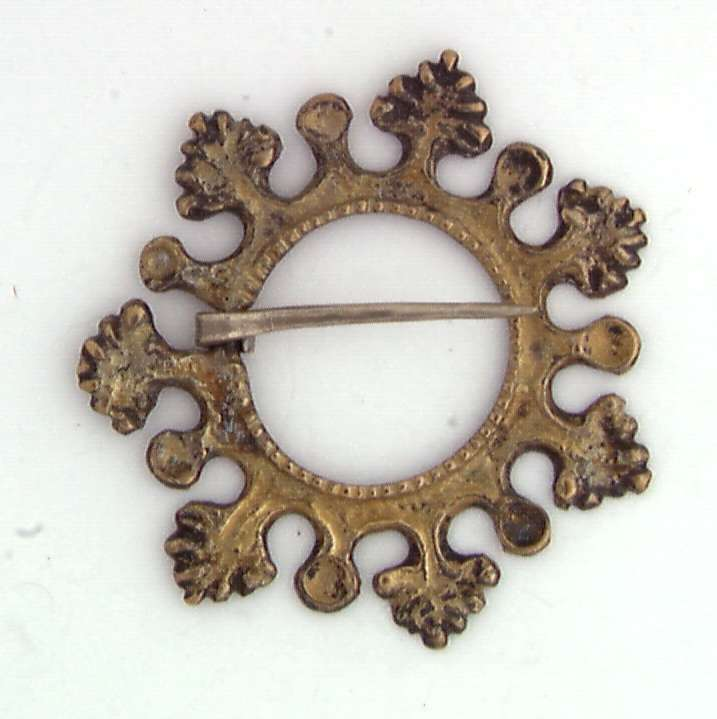 Forgylt sporesølje av sølv, fra Gol i Buskerud. Foto: Anne-Lise Reinsfelt / Norsk Folkemuseum, NF.1909-0349.